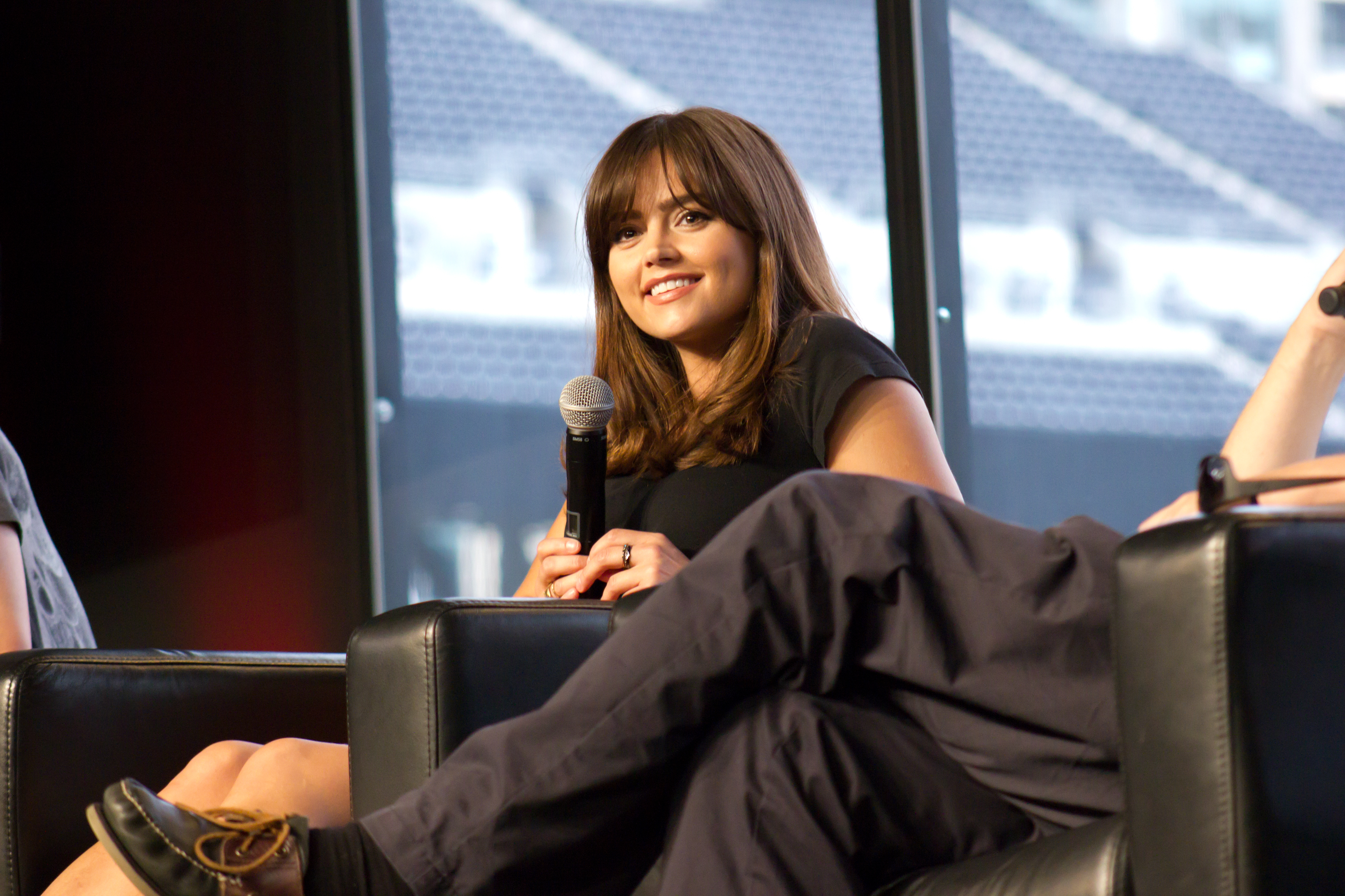 Jenna Coleman